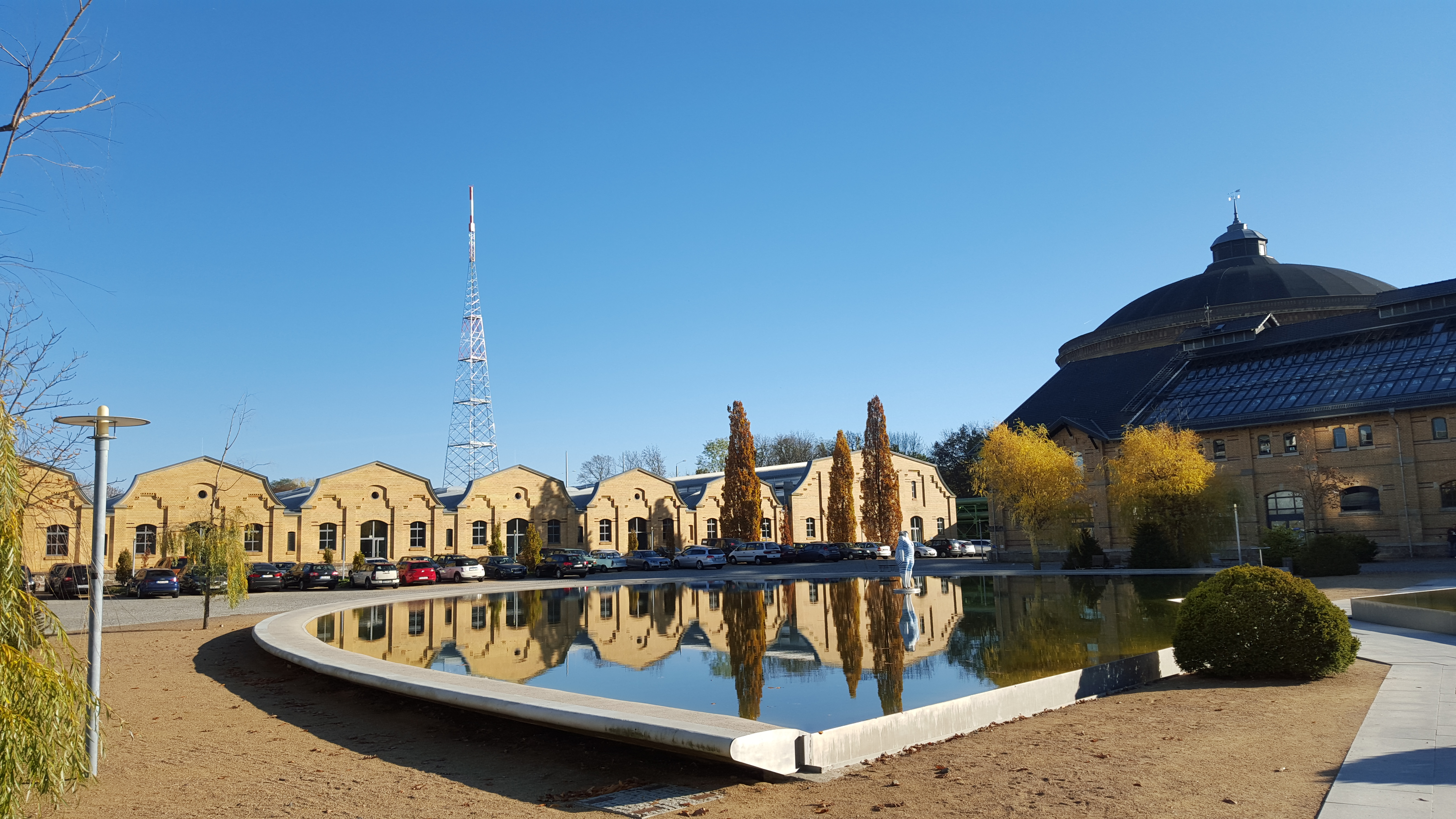 Der 192 Meter hohe Sendemast, u.a. für die Verbreitung von DVBT-2 in der Nähe der MDR Sendezentrale an der Zwickauer Straße in Leipzig